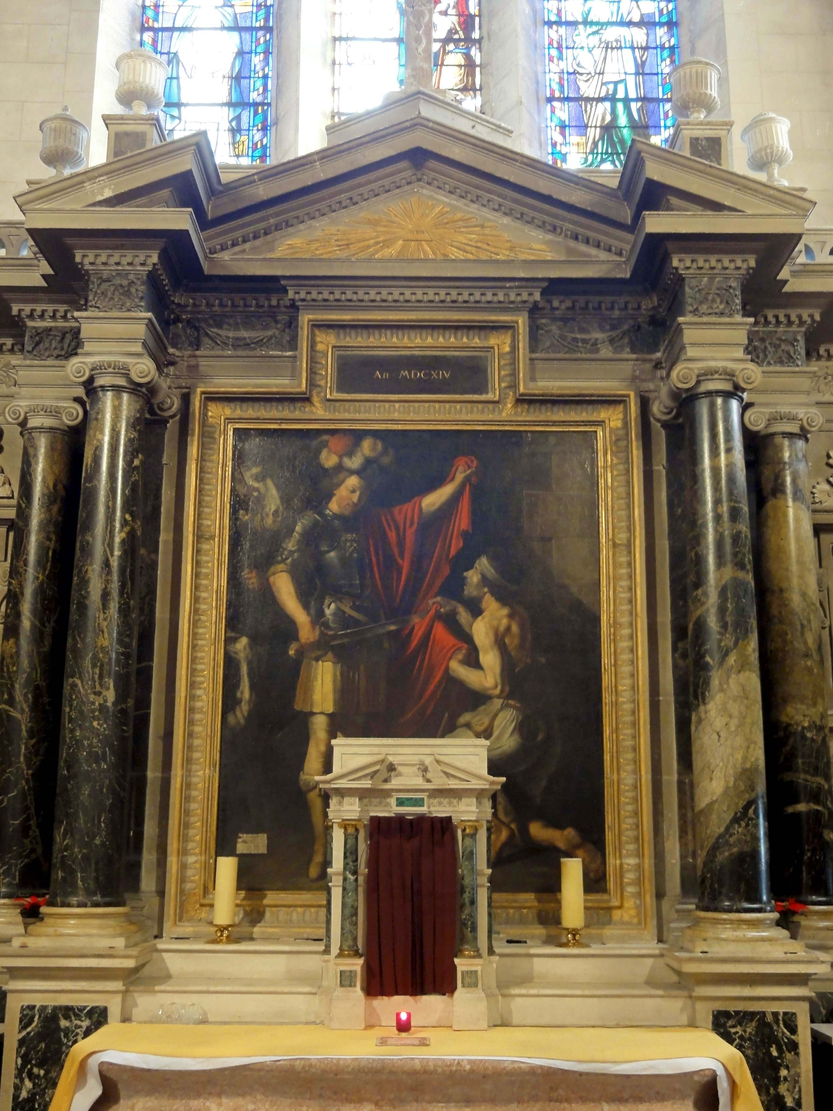 Voir titre.